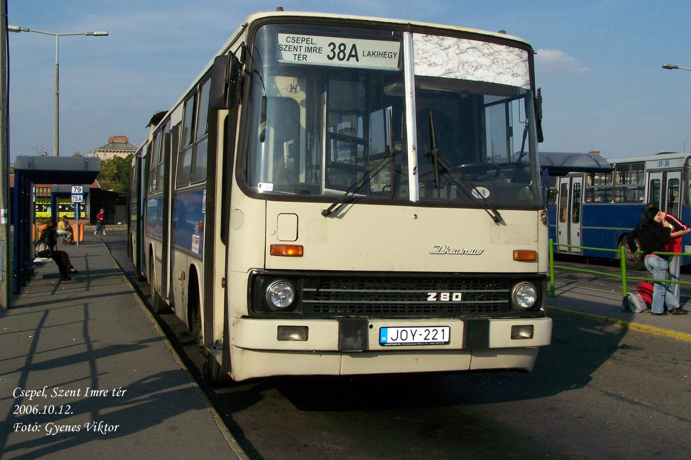 38A jelzésű Ikarus 280-as busz a Szent Imre téren